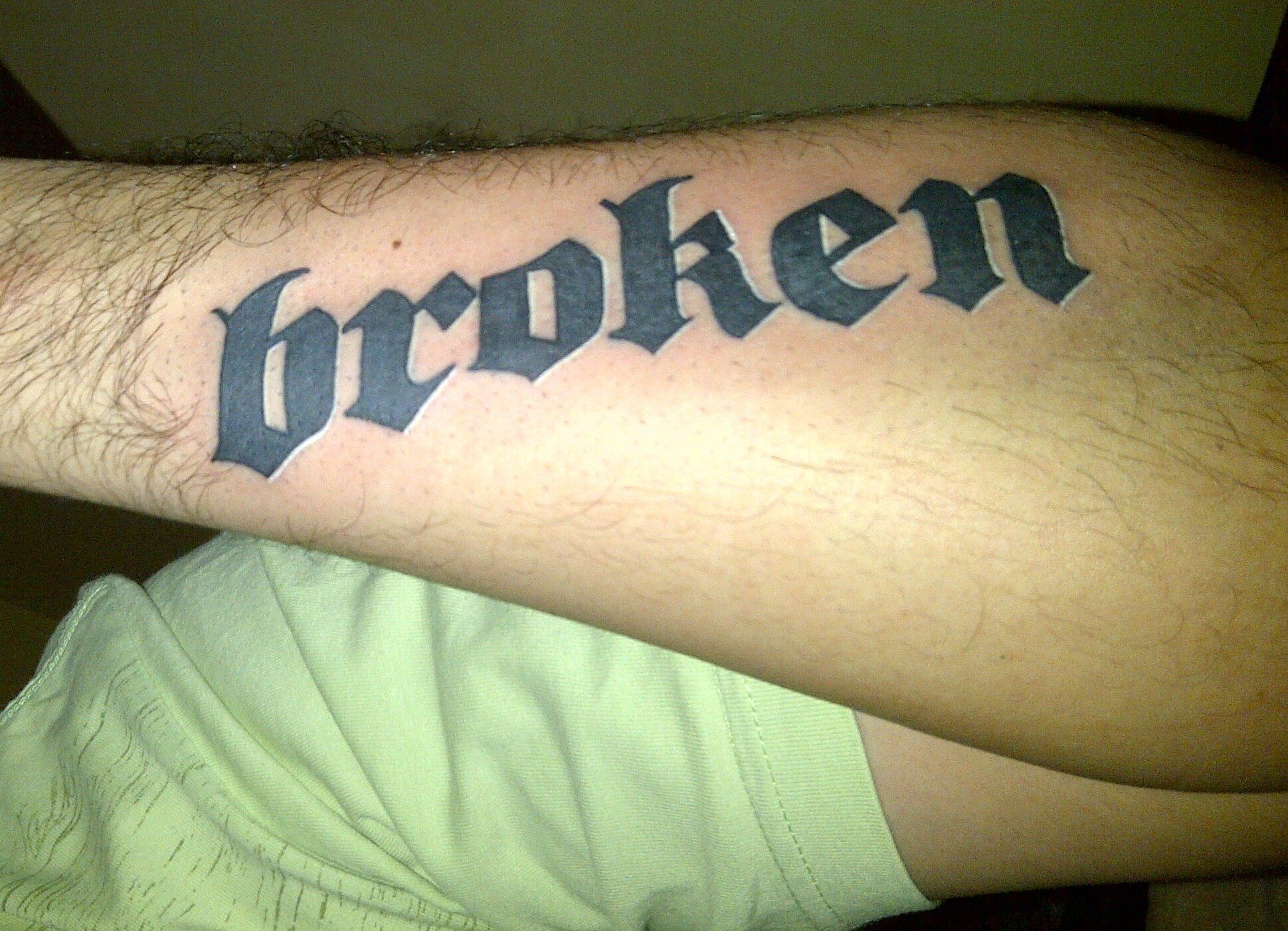 Nama anak.bro & ken